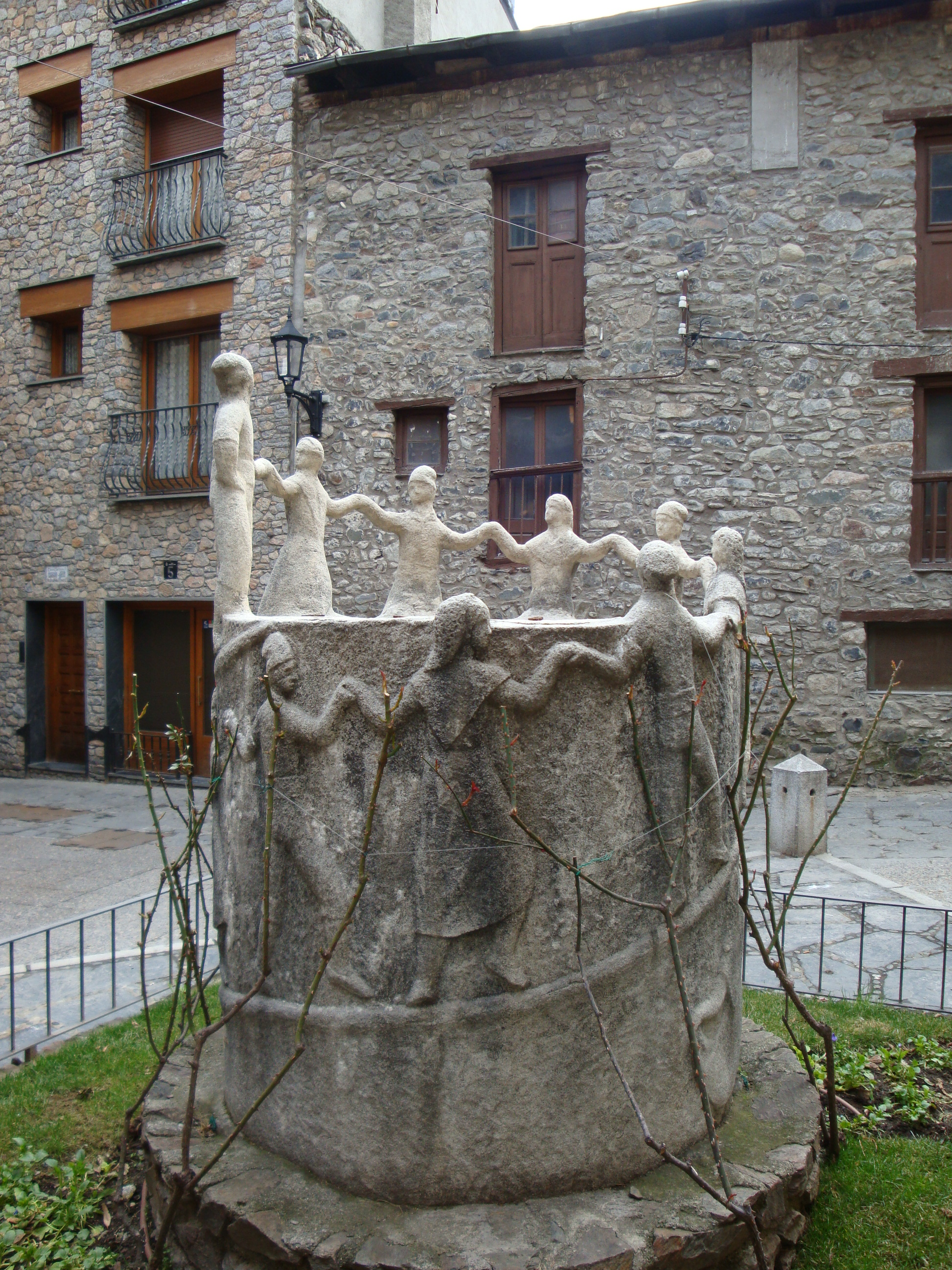 Monumento en Andorra